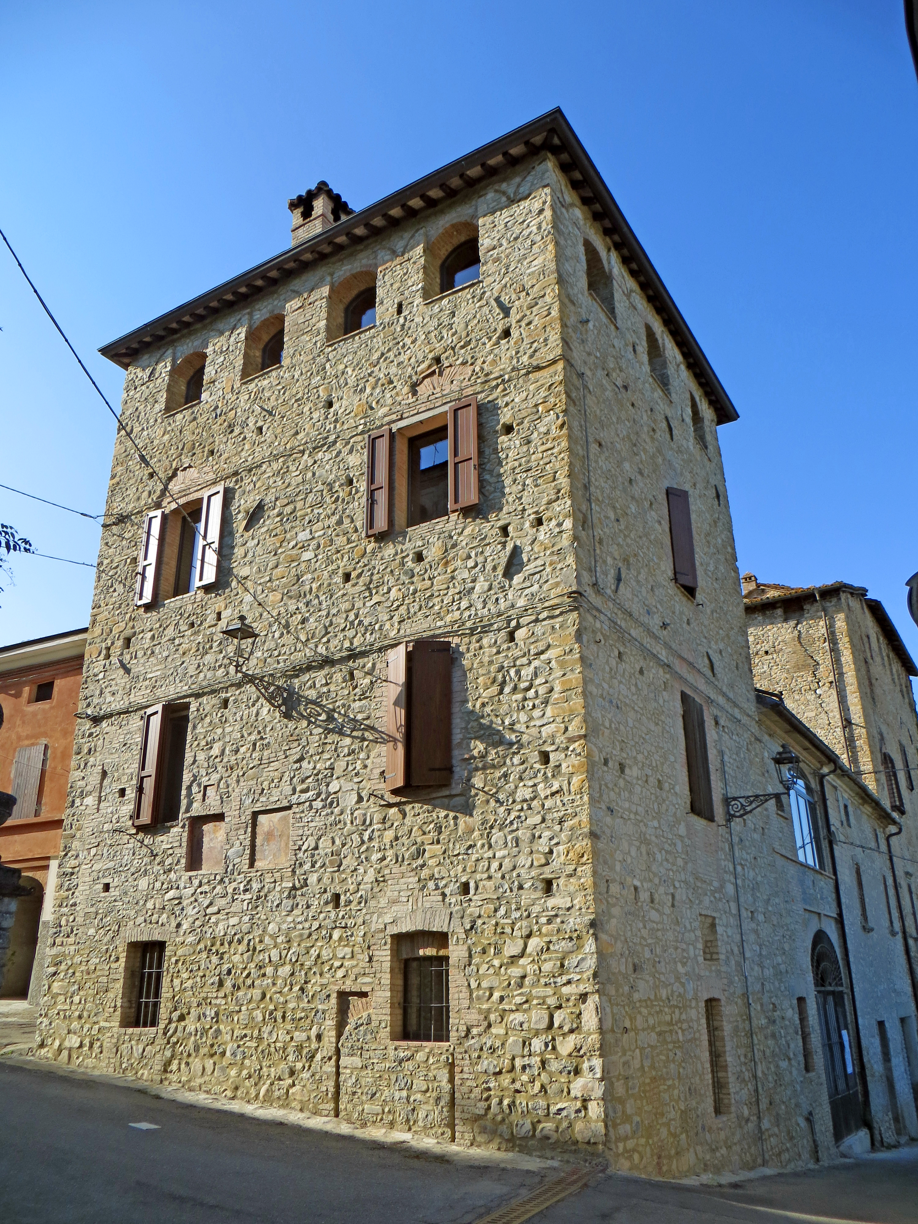 Castello (San Vitale Baganza, Sala Baganza) - mastio